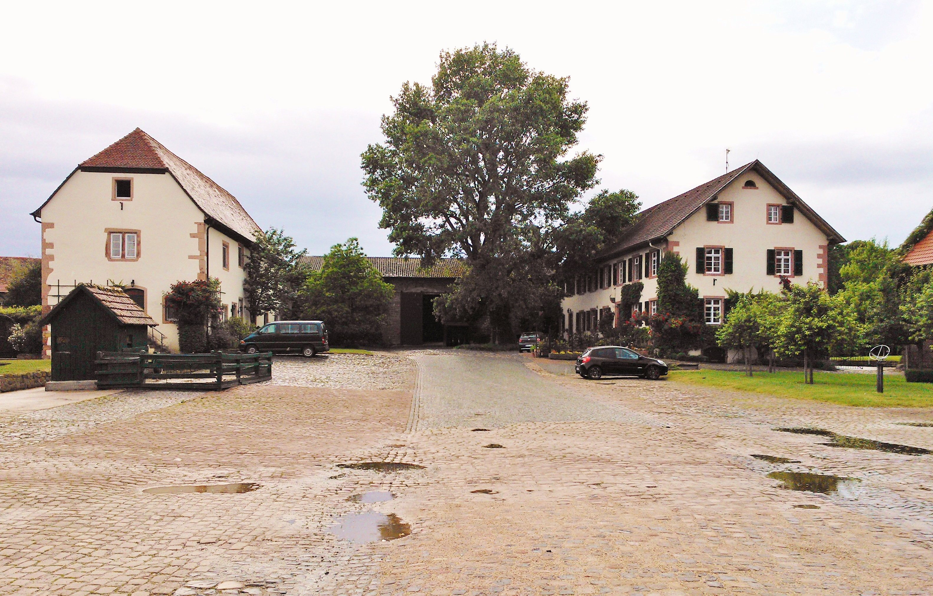 Innenhof des heutigen Hofgutes der ehem. Burg Habitzheim. Links die ehem. Kapelle/Speicher; rechts das Wohnhaus